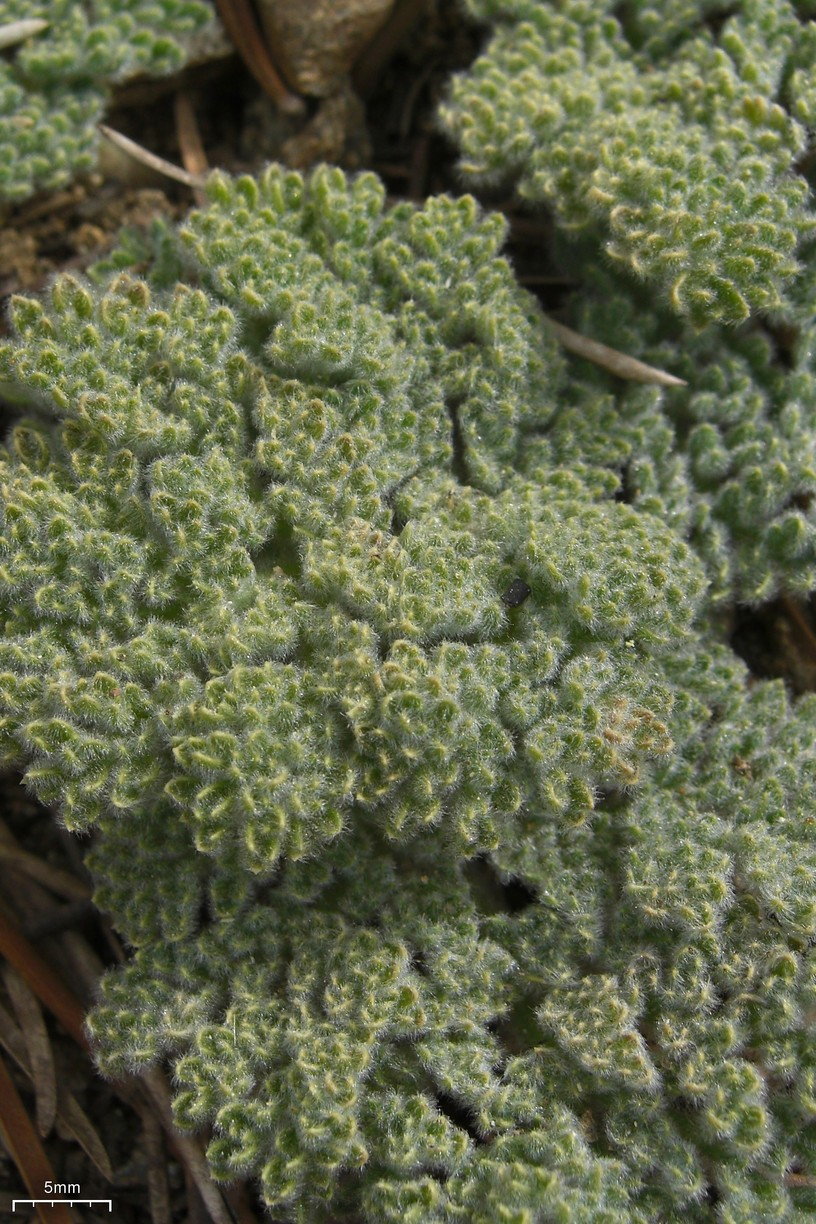 Oreonana vestita 20100826.68 Mount Baden-Powell, San Gabriels, so. CA